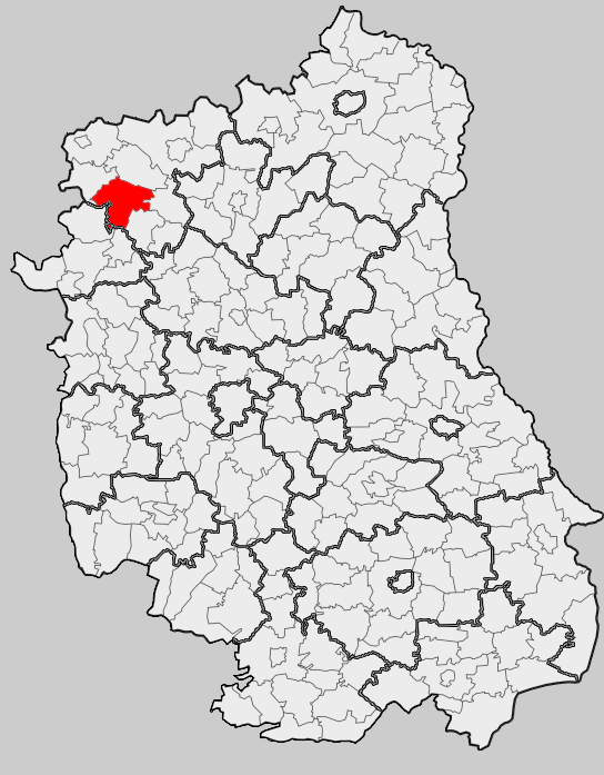 Map of gmina Krzywda, Łuków county, Lublin voivodship Mapa gminy Krzywda, powiat łukowski, województwo lubelskie